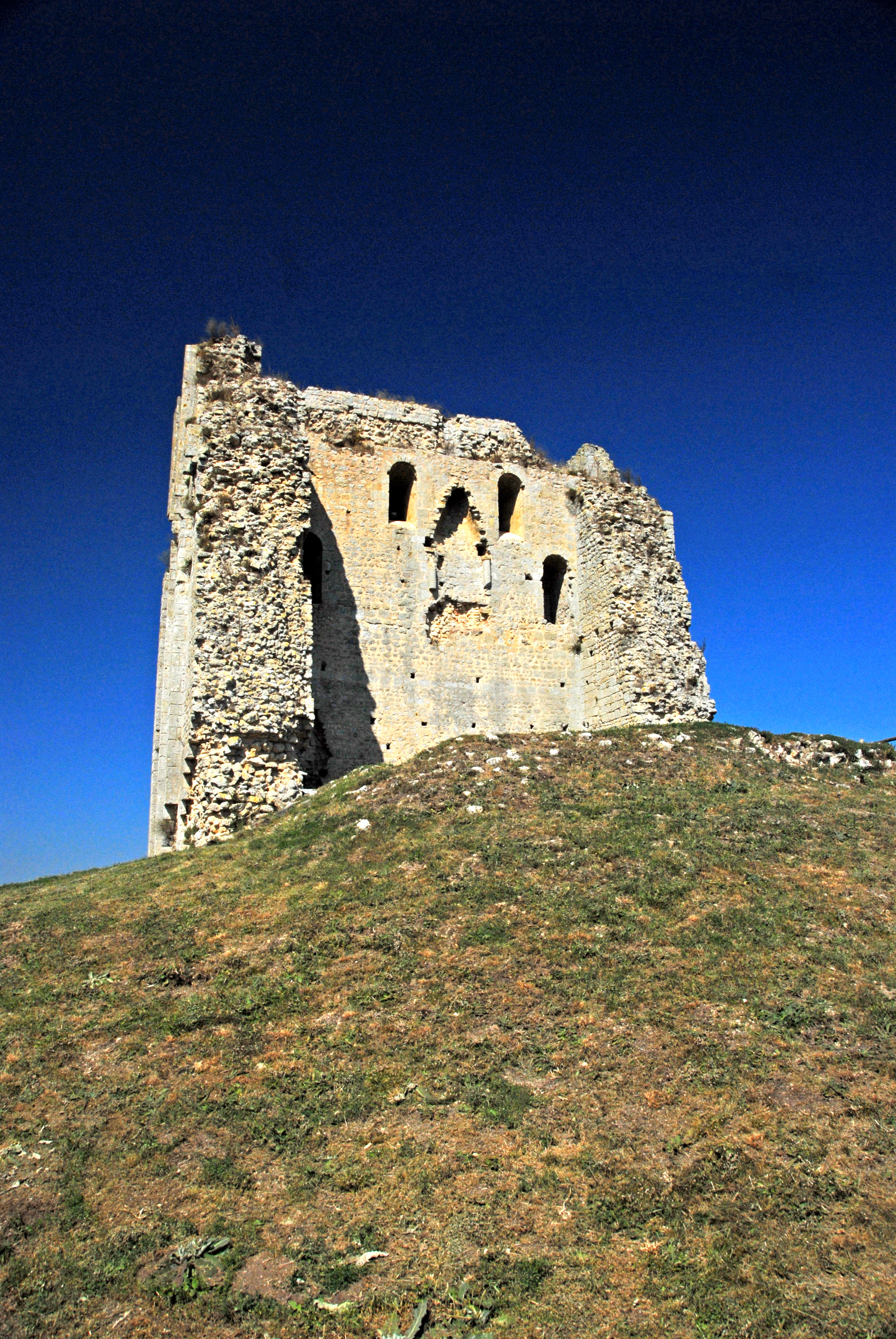 Tour-de-Broe, Der Puy mit Krönung